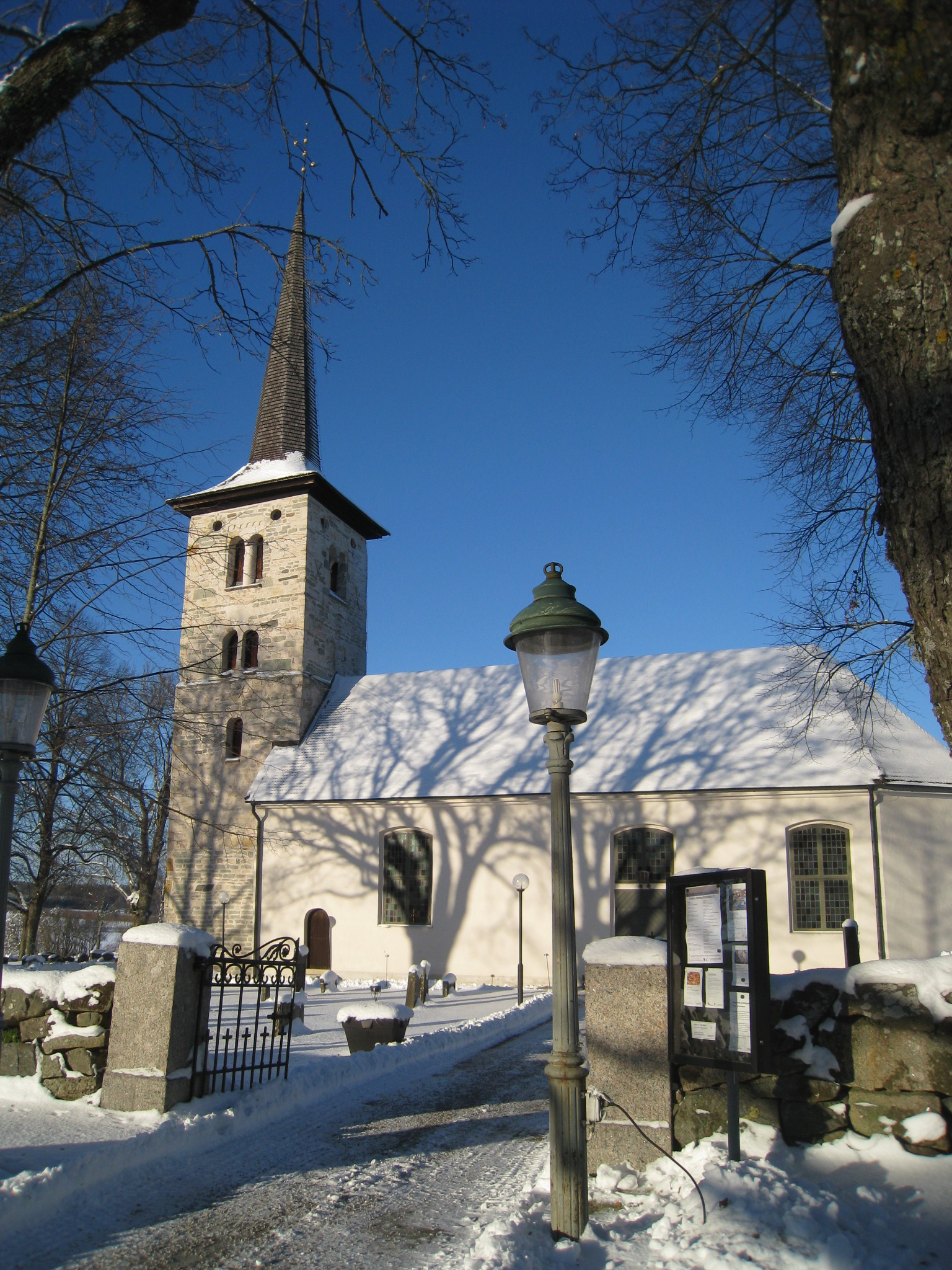 Hovsta kyrka i Axbergs församling, Örebro. Kyrkan ligger på slätten vid Kyrkvägen i Lillån cirka 5 km norr om Örebro och cirka 4 km söder om tätorten Hovsta.